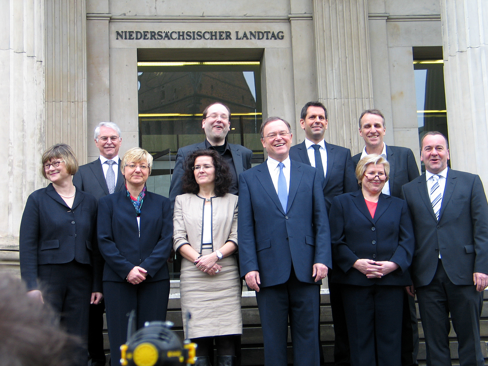 Gruppenbild des neuen Kabinetts nach der Wahl von Stephan Weil zum neuen niedersächsischen Ministerpräsidenten, hier auf den Stufen vor dem Niedersächsischen Landtag; von links: Antje Niewisch-Lennartz, Peter-Jürgen Schneider, Frauke Heiligenstadt, Gabriele Heinen-Kljajic, Christian Meyer, Stephan Weil, Olaf Lies, Cornelia Rundt, Stefan Wenzel und Boris Pistorius.